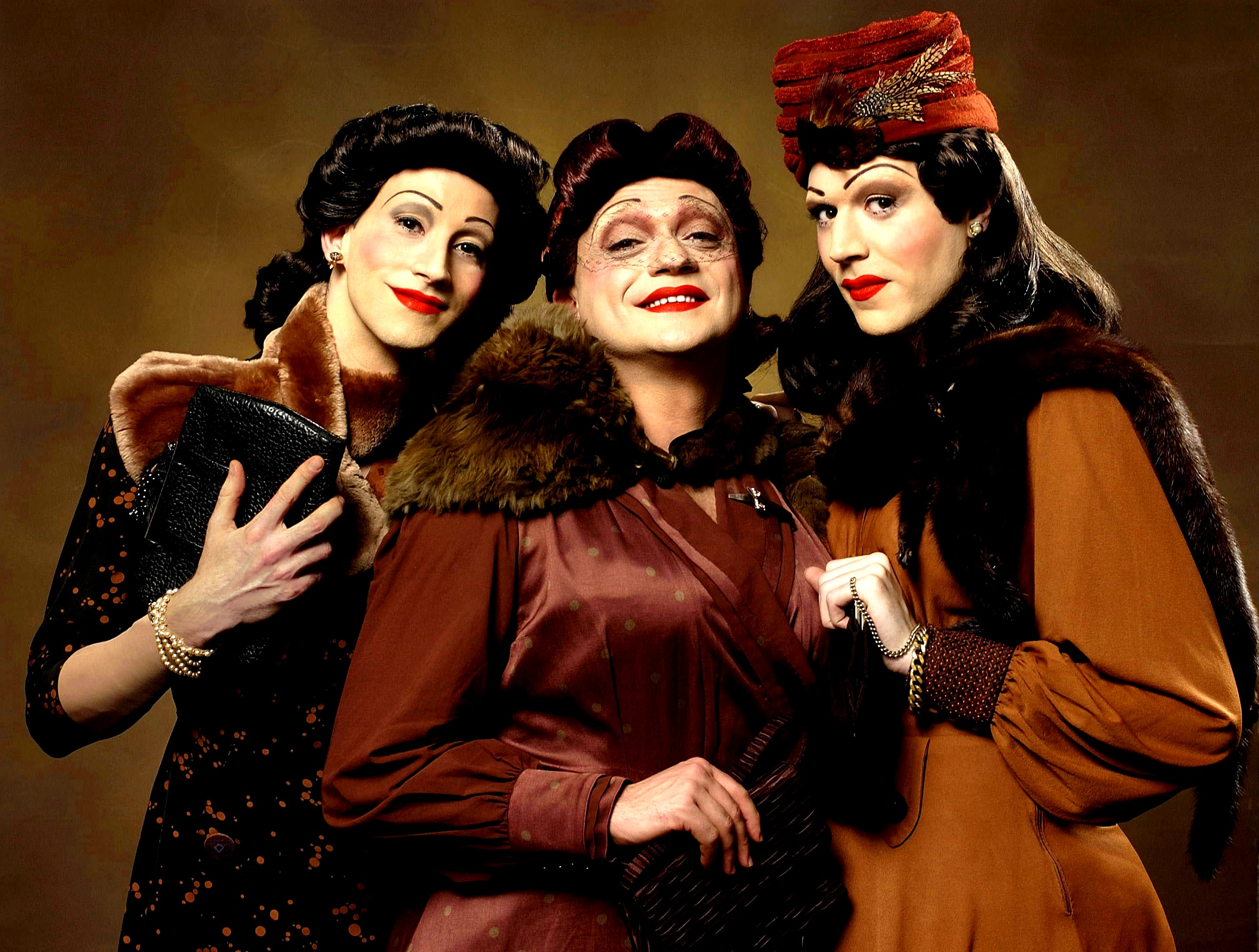 Immagine del gruppo vocale italiano Le sorelle Marinetti